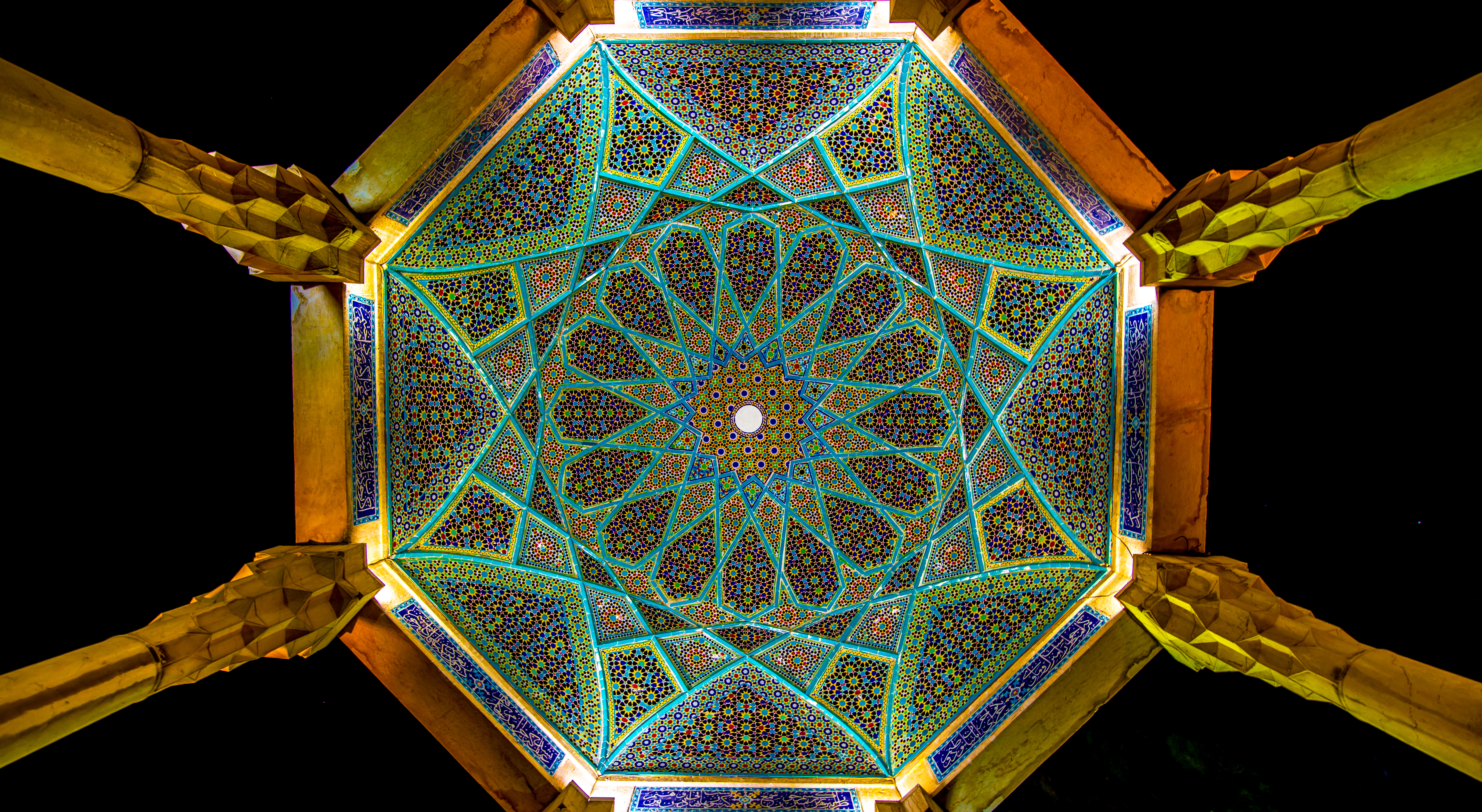 حافظیه